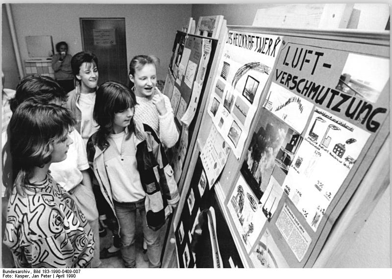 Jena, Schulprojekt zur Umweltverschmutzung ADN-Kasper 9.4.90-Bez.Gera-"Wenig Vorteile - viele Nachteile" lautet das Urteil von 31 Schülern der 7. Klasen der Matrossow-Oberschule in Jena-Winzerla nach ihrem einwöchigen Projektunterricht zum Thema Heizkraftwerk. Die Ergebnisse ihrer Untersuchungen über den größten Umweltverschmutzer der Saalestadt zeigen sie in einer kleinen Ausstellung. Mit dieser Form der pädagogischen Arbeit wollen die Jenaer Lehrer zu neuen Unterrichtsmethoden finden.